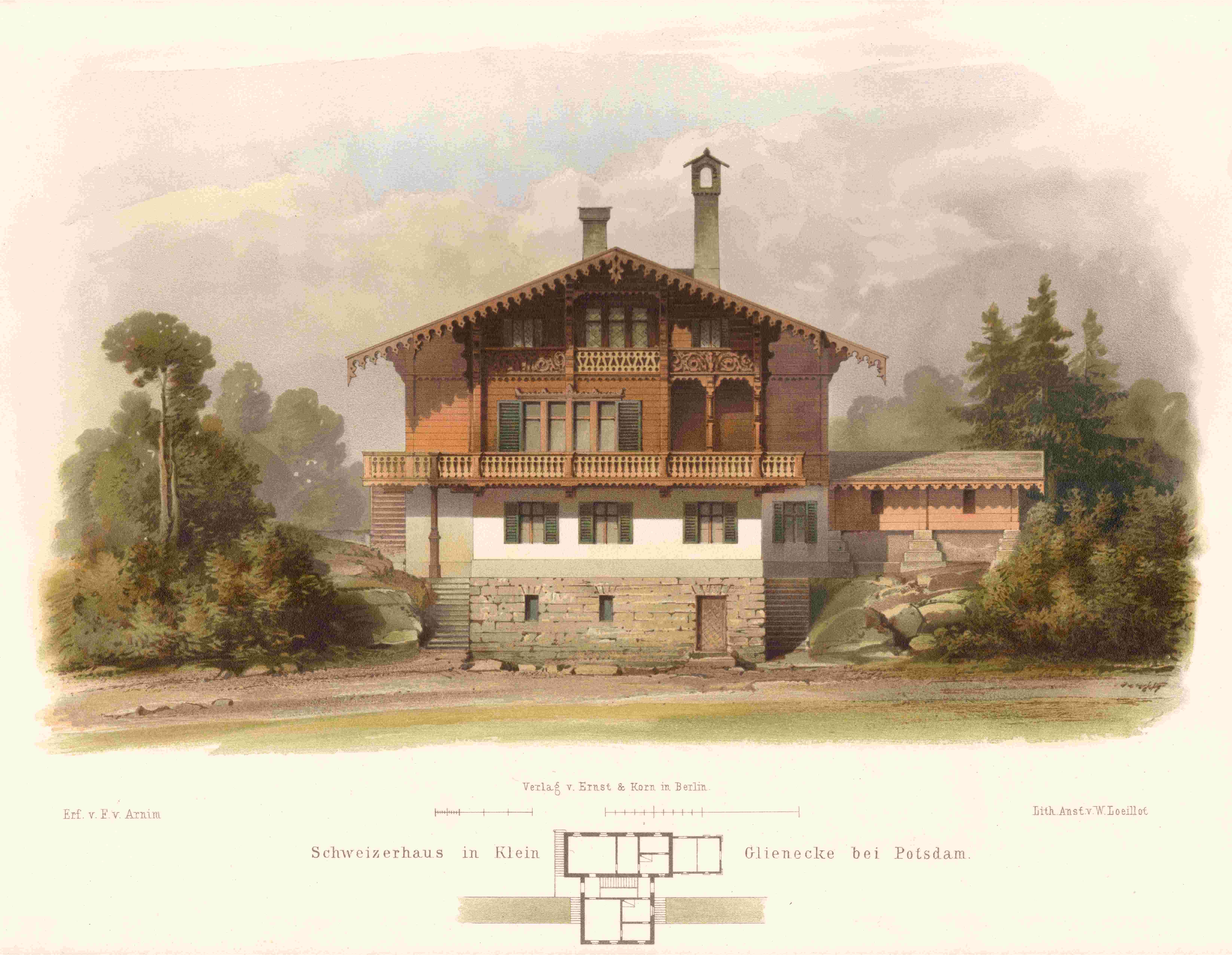 Berlin, Klein Glienicke, Schweizerhaus 1 von Ferdinand von Arnim